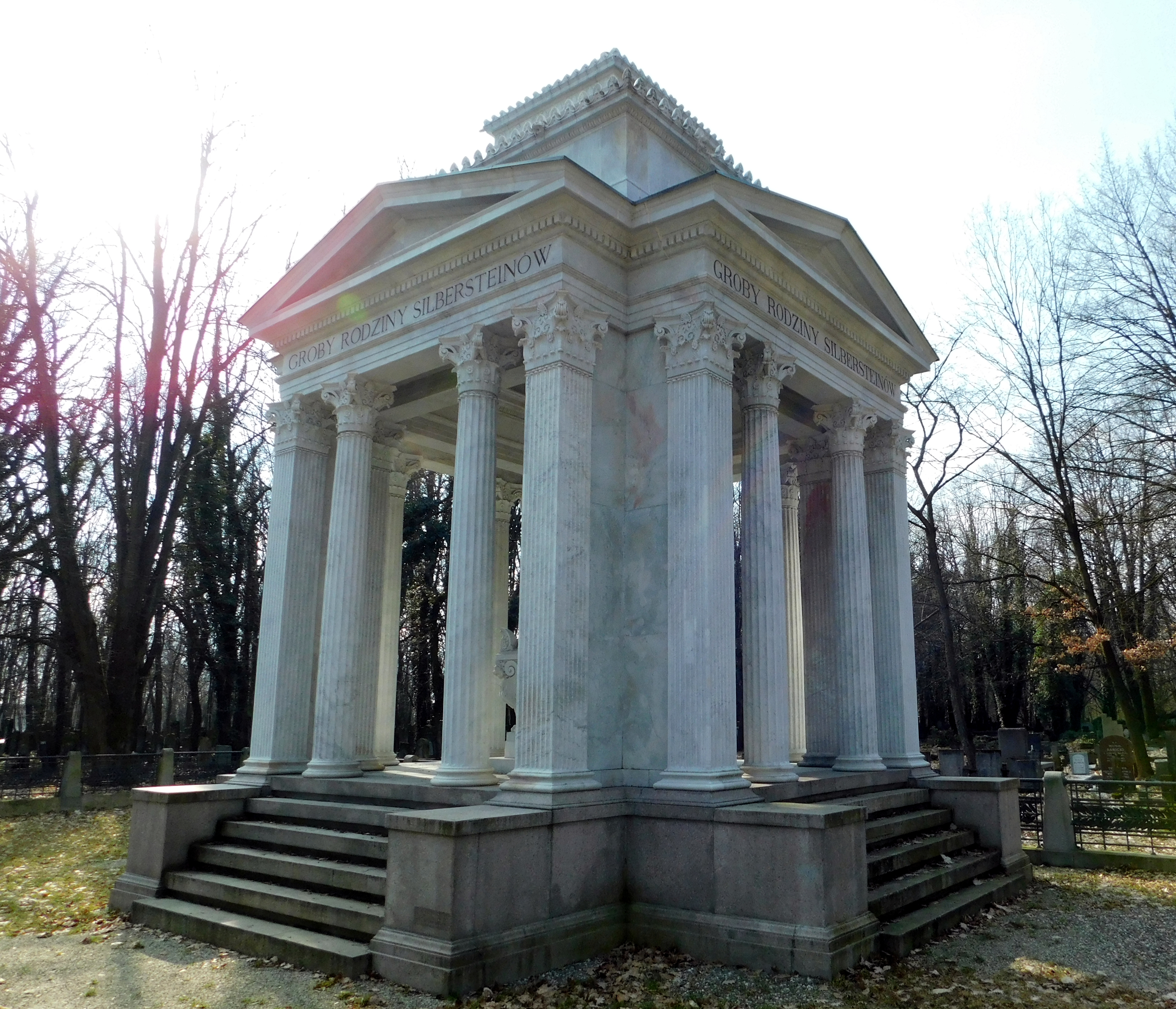 ŁÓDŹ (Лодзь, לודז'). Cmentarz żydowski. Jewish cemetery. Grobowiec Markusa i Teresy Silbersteinów.